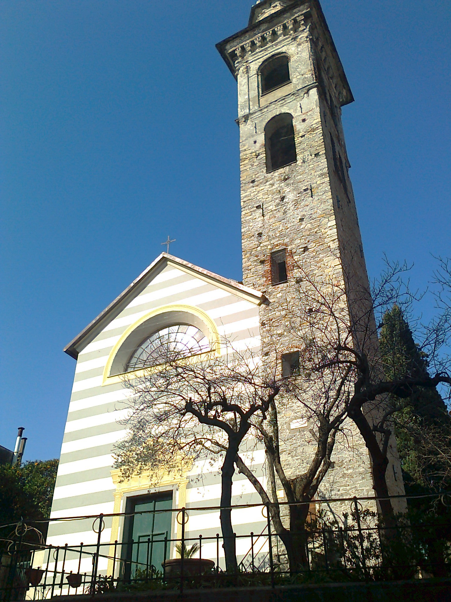 Chiesa di Santo Stefano di Rapallo, Liguria, Italy